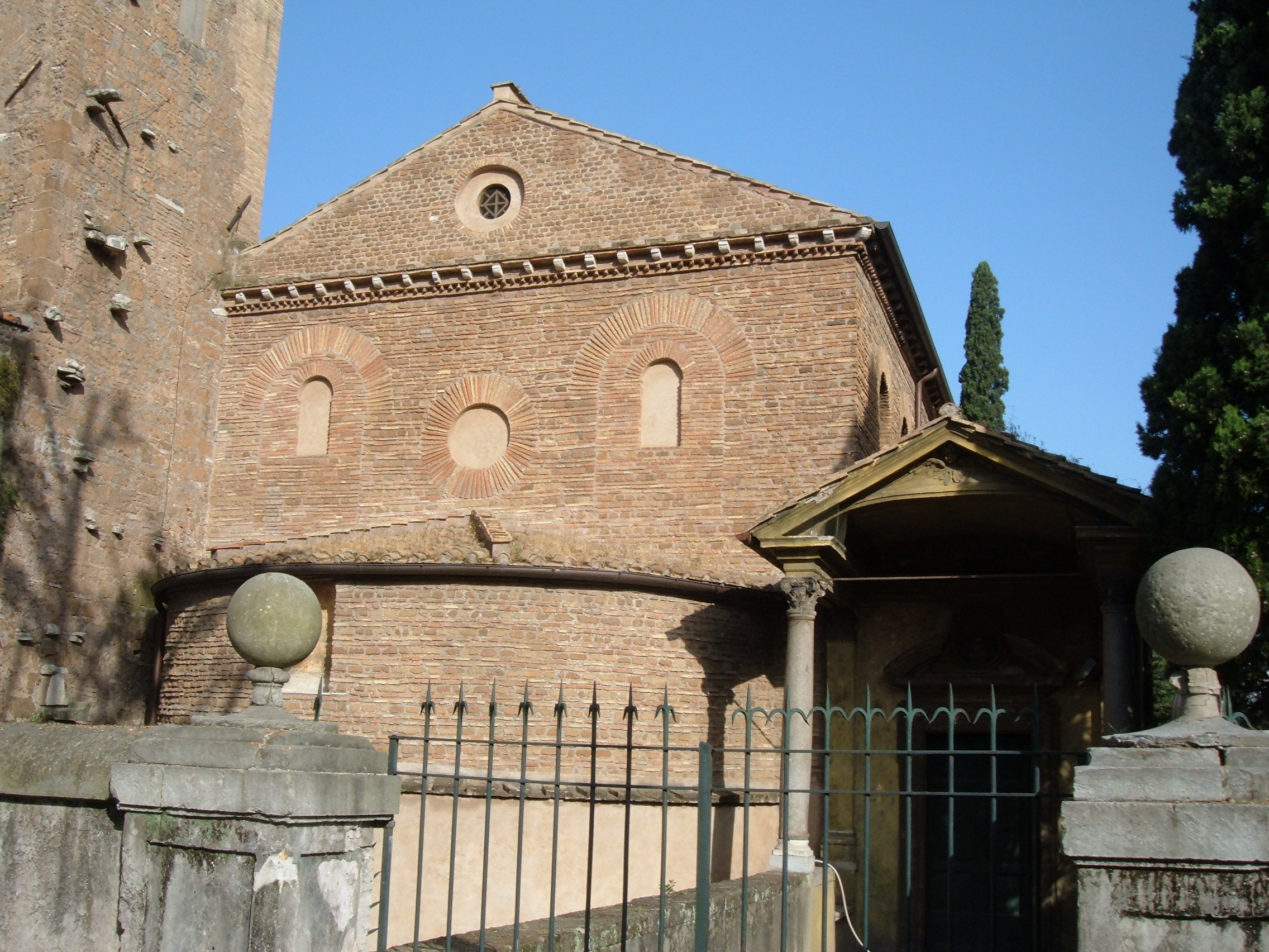 Basilica di Sant'Agnese fuori le Mura, a Roma, nel quartiere Trieste (Q. XVII). Il retro della basilica..